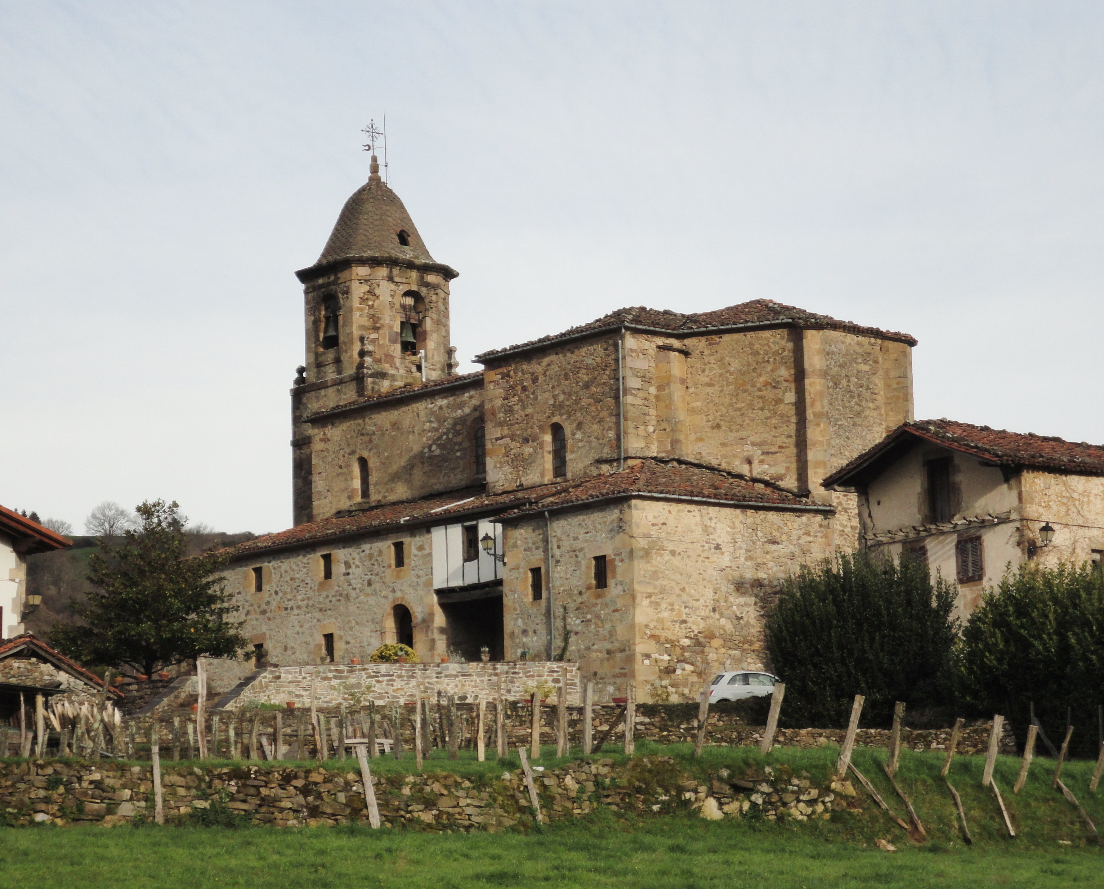 San Martin eliza - Berroeta